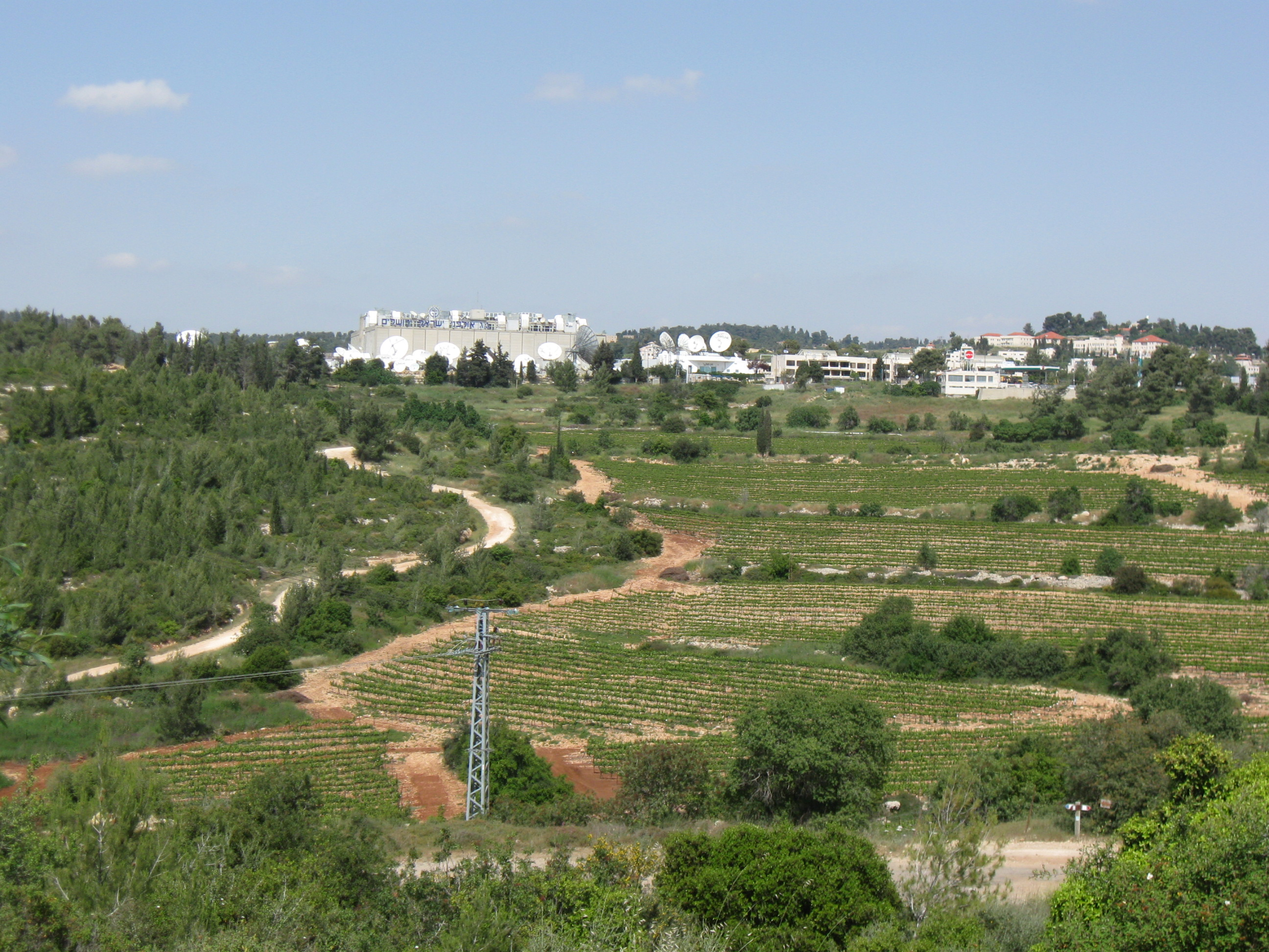 אולפני השידור בנווה אילן